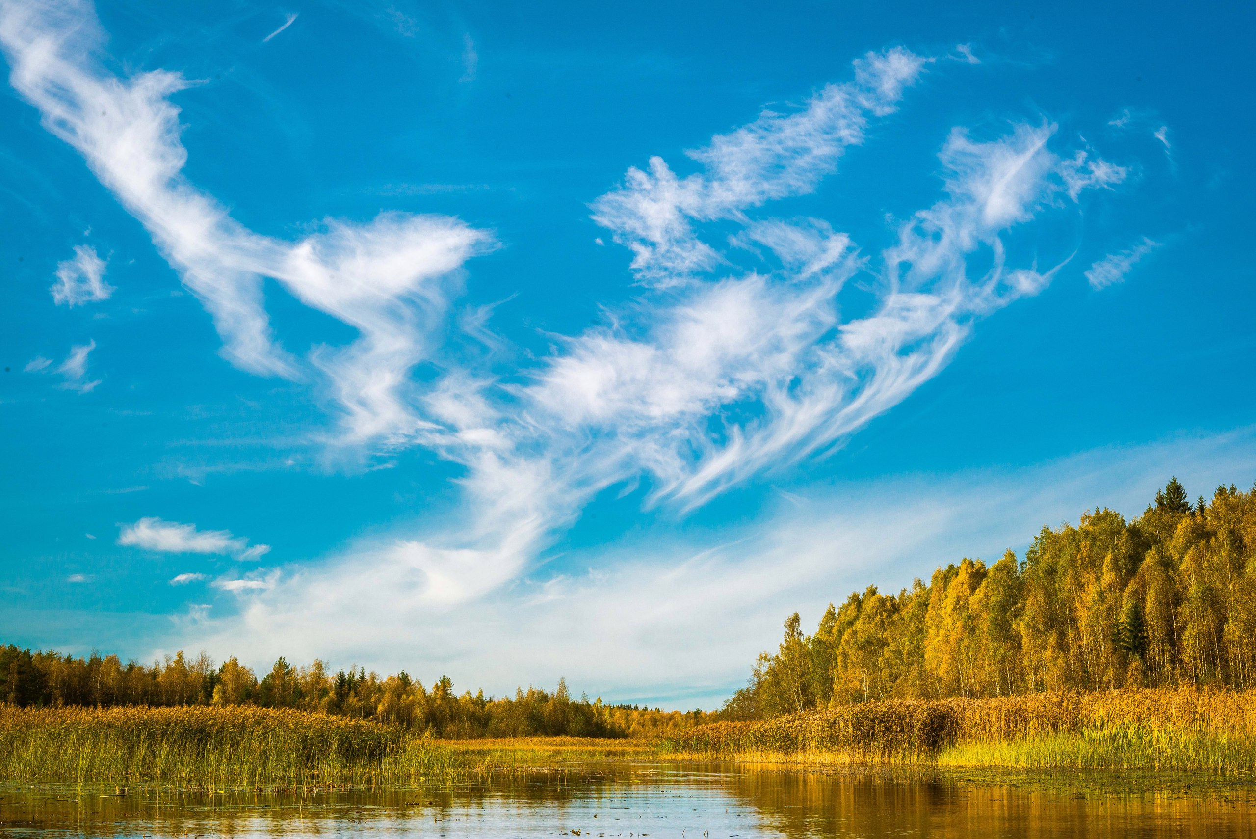 Озеро Мстино: Вышневолоцкий район, Тверская область This image is related to the protected area of Russia number 6910204